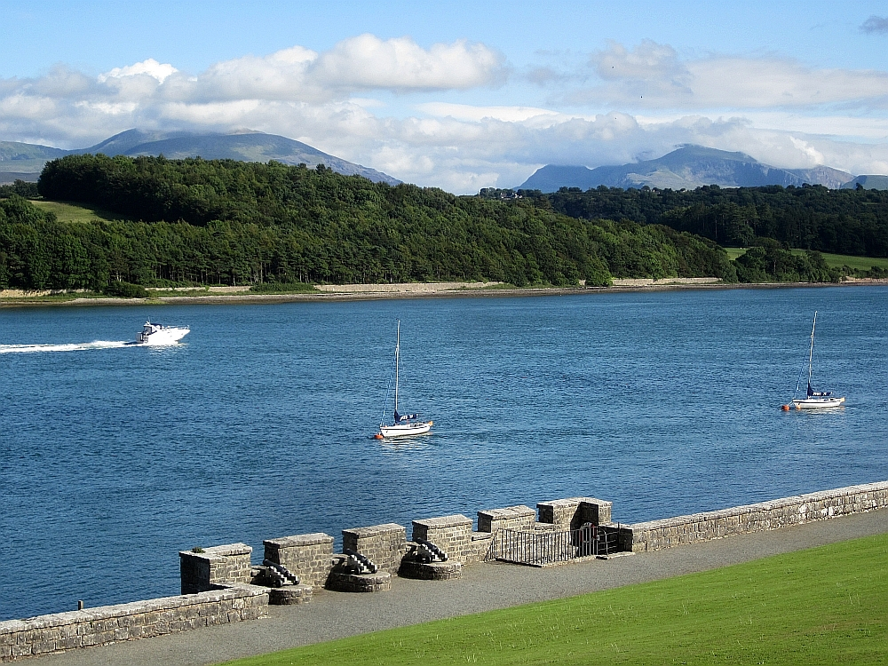 Plas Newydd Anglesey UK